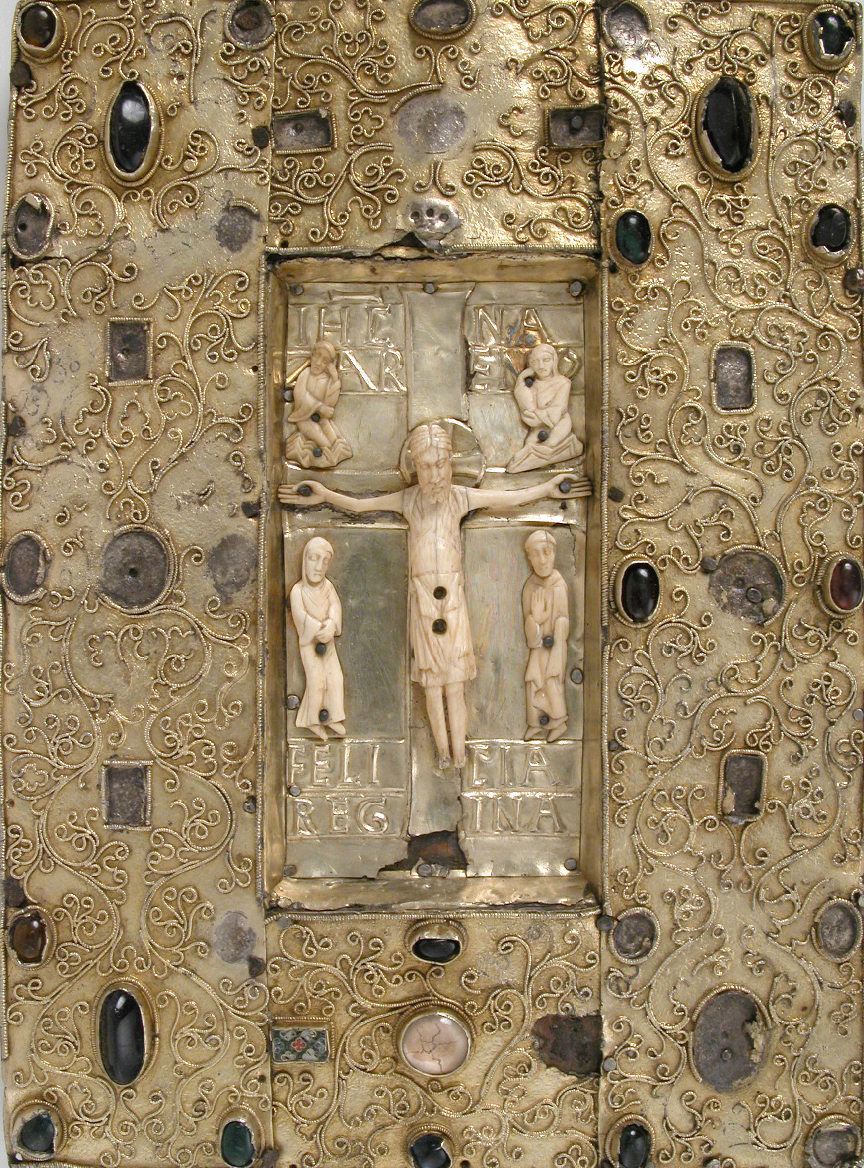 Cubierta del Evangelario de la reina de Aragón Felicia de Roucy, esposa de Sancho Ramírez (rey de Aragón 1063–1094), casada ca. 1070 con el monarca aragonés. Inscripción: I H C / NA/SAR/EN(V)S, FELI/CIA/REG/INA